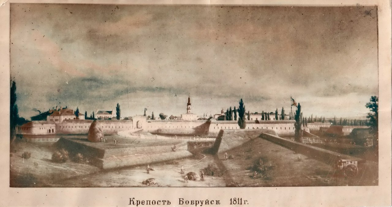 Беларуская (тарашкевіца): Рэпрадукцыя карціны М. Залескага (1796-1877) "Замасьць, від шанцаў і бастыёнаў з паўночнага боку". Памылковы подпіс унізе сьцьвярджае, што гэта фартэцыя ў Бабруйску.